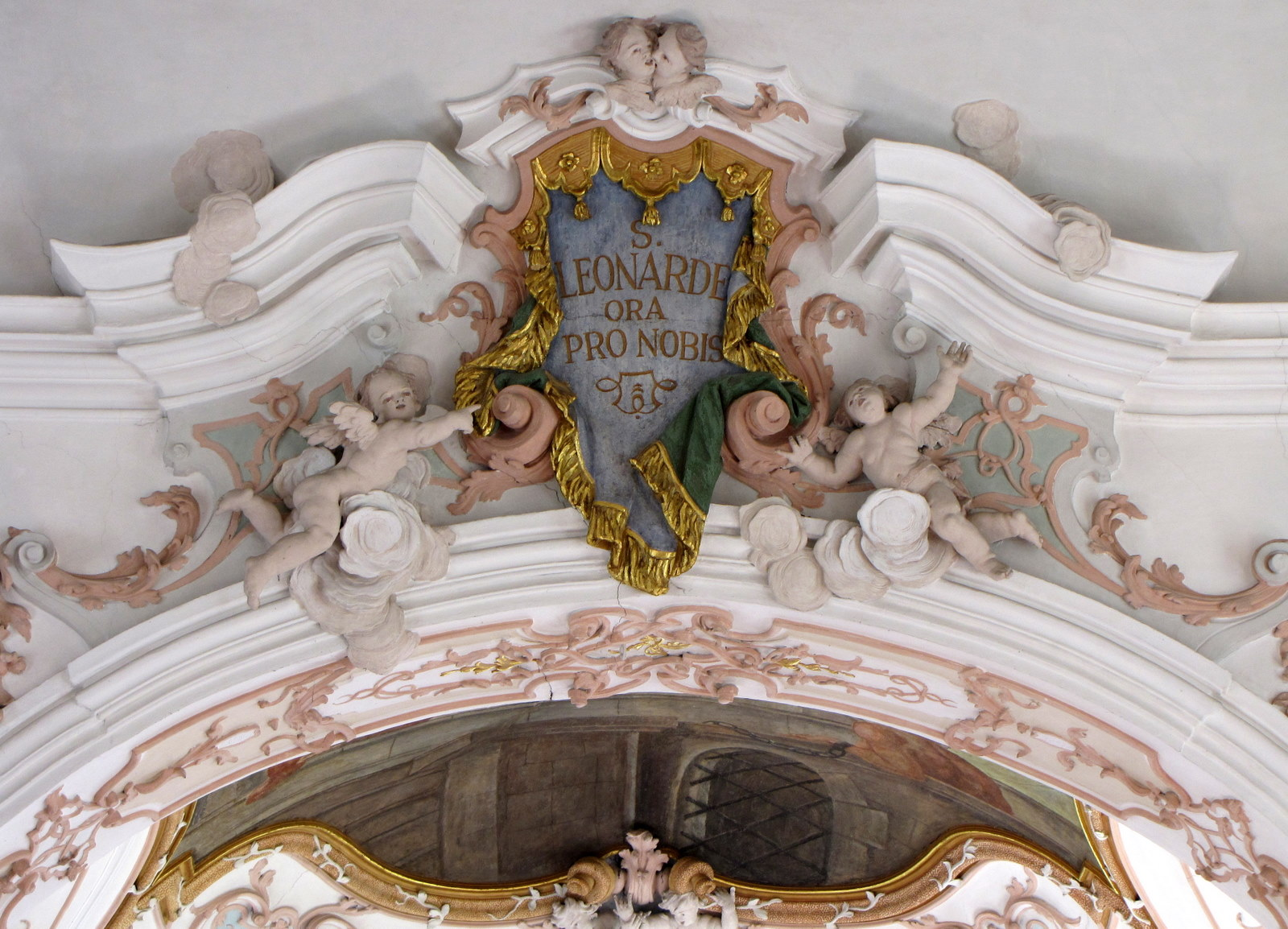 Stuckarbeiten von Peter Heel in der Filialkirche Pfronten-Heitlern